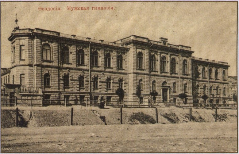 Феодосийская мужская гимназия